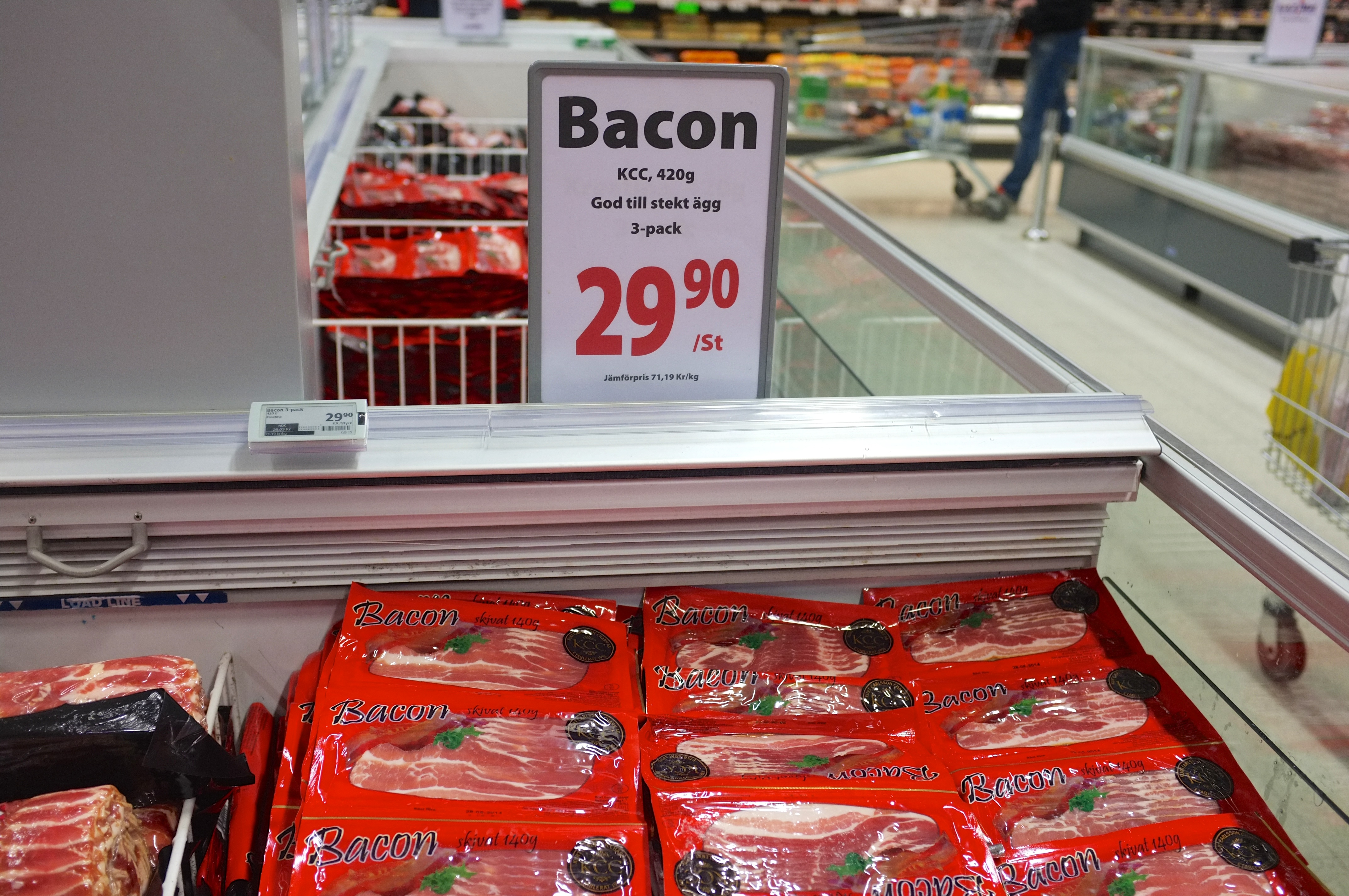 Bacon. Nordby Shoppingcenter i Sverige.